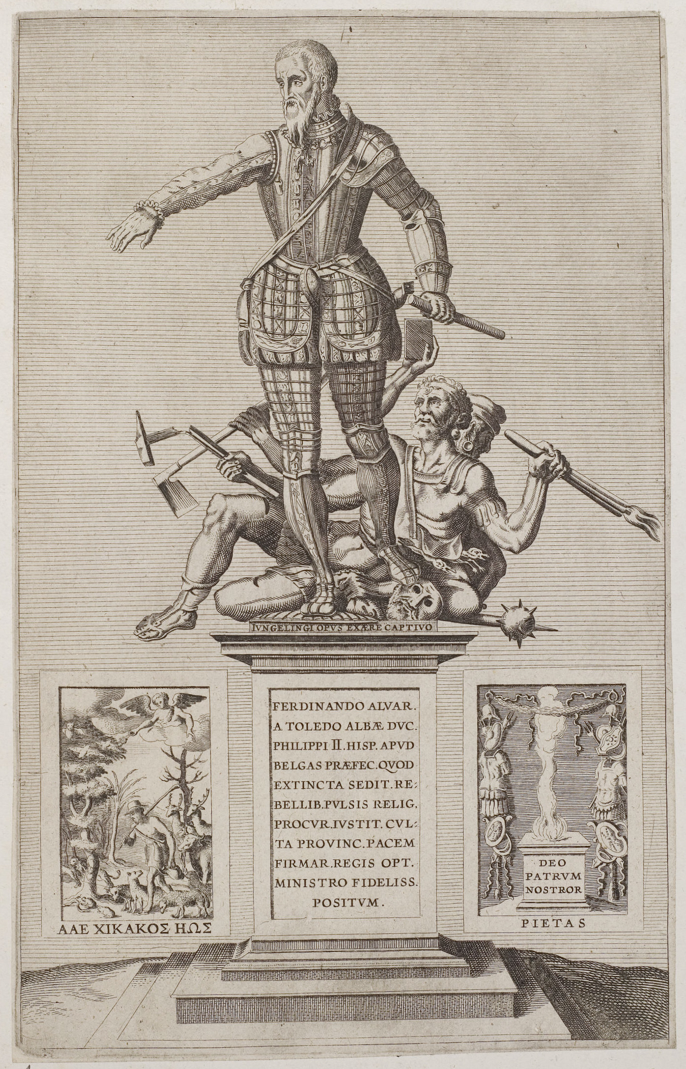 Grafik aus dem Klebeband Nr. 2 der Fürstlich Waldeckschen Hofbibliothek Arolsen Motiv: Standbild des Herzog Alba (Fernando Álvarez de Toledo) in Antwerpen